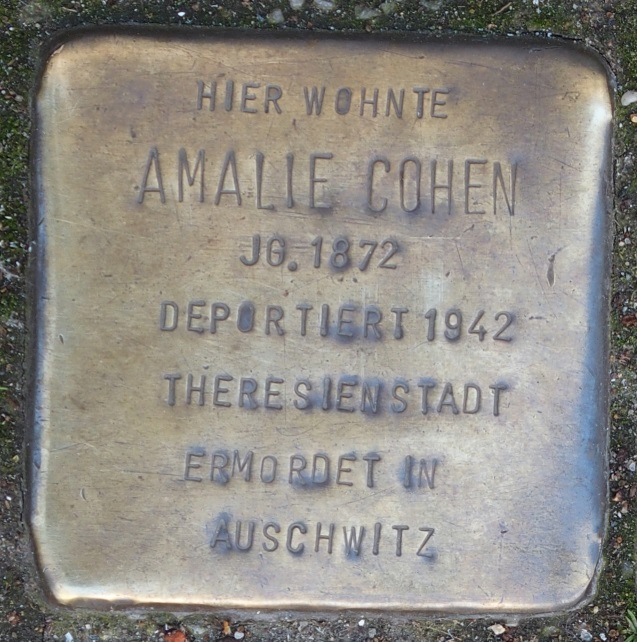 Stolperstein in Soest Jakobistraße 27, Amalie Cohen